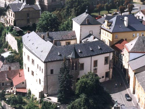 Palác Hrádek, Barborská 28/9, Kutná Hora